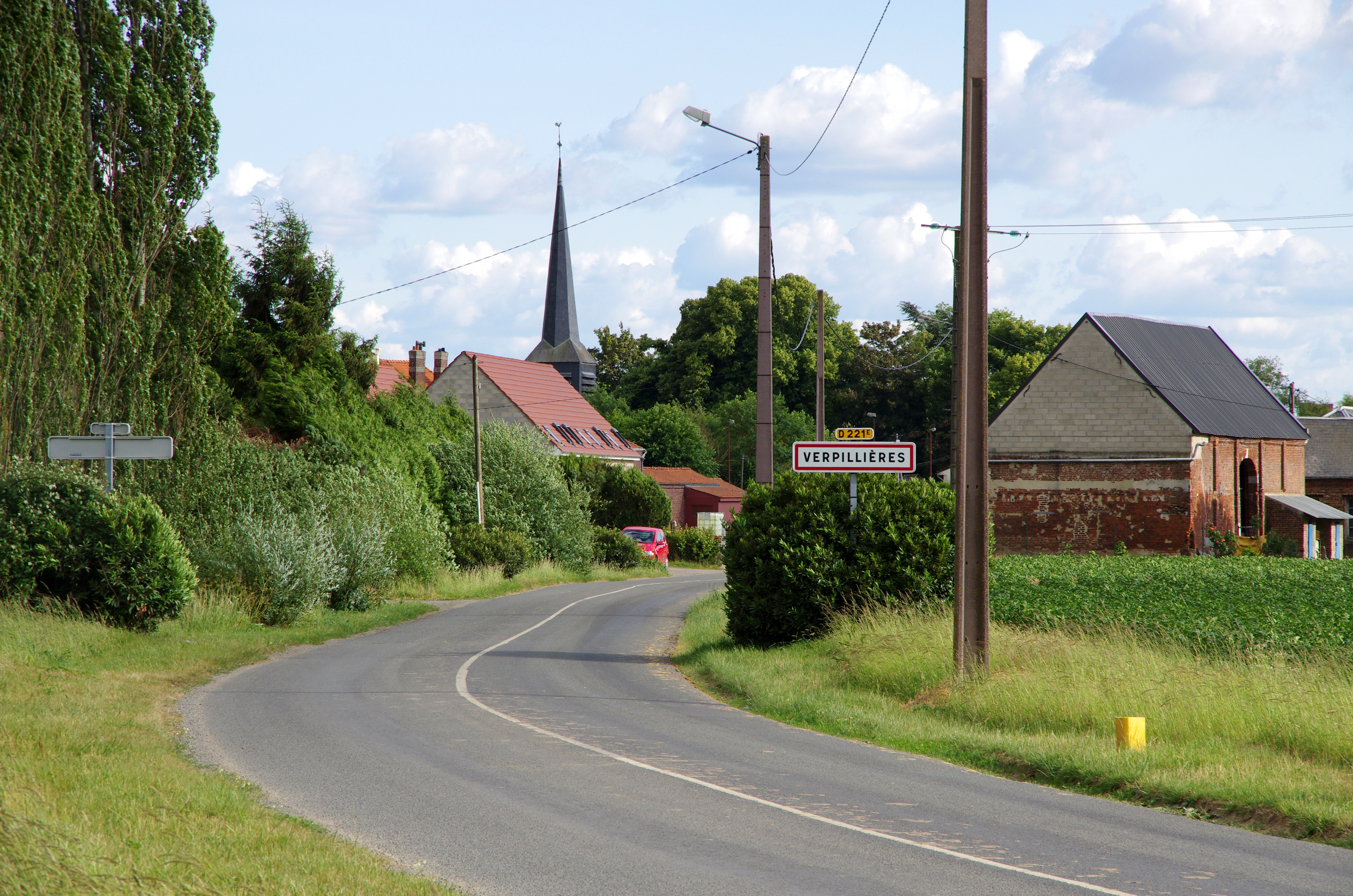 Verpillières (Somme, France) - L'entrée du village, en venant de Roye. .